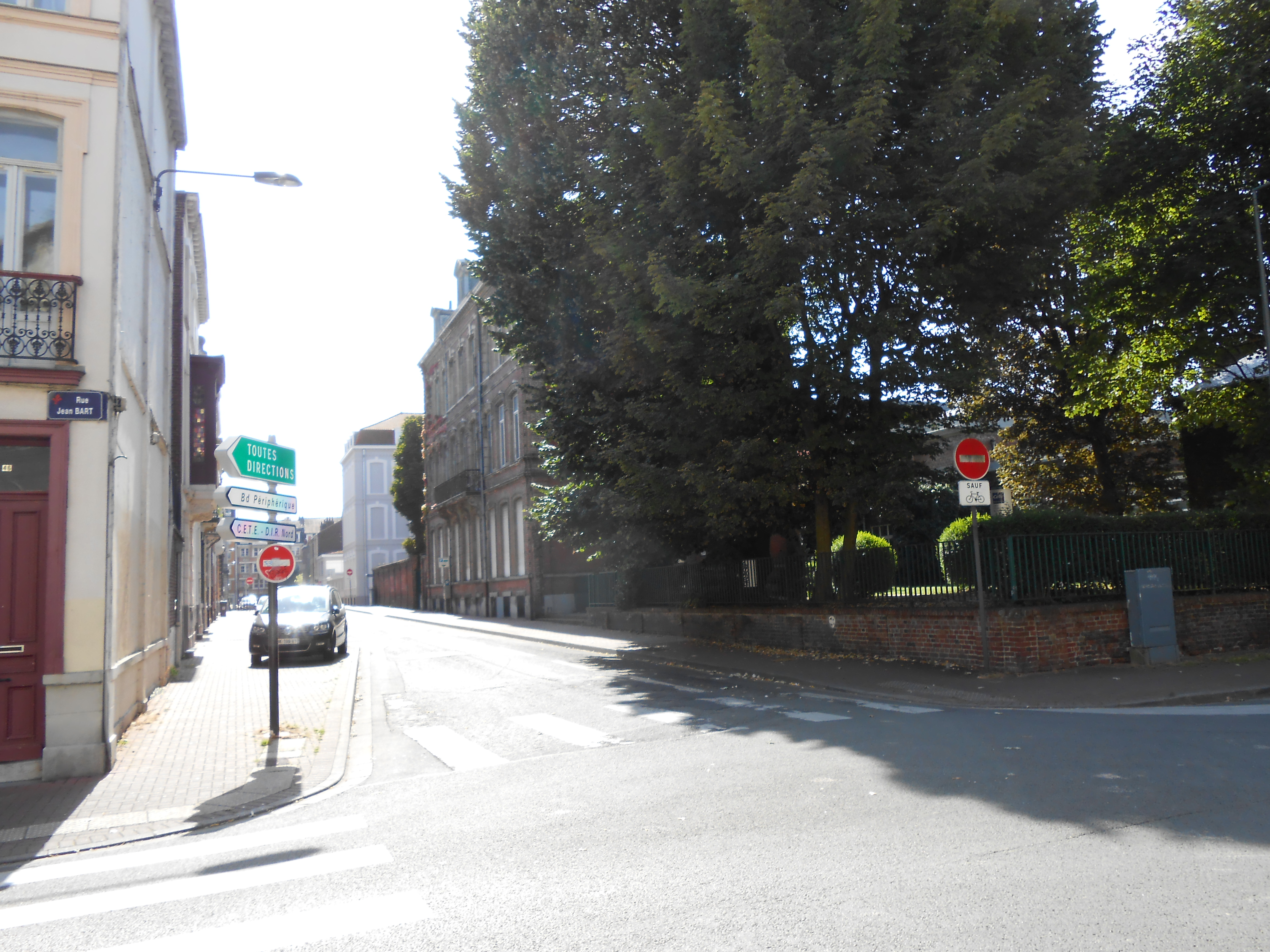 Angle de la rue Jean Bart et de la rue de Bruxelles à Lille